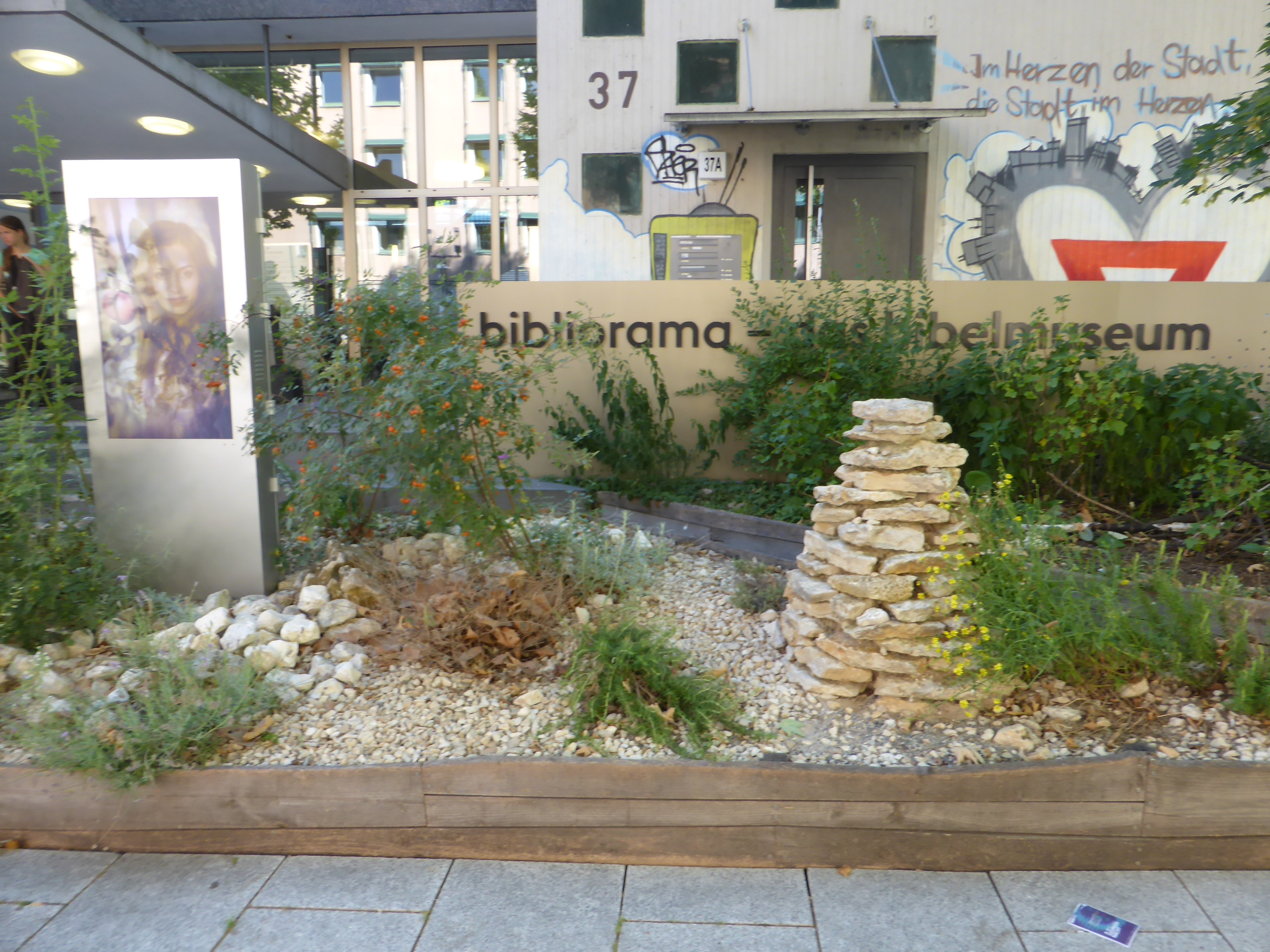 Bibliorama